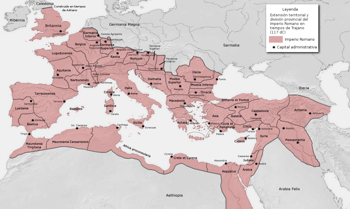 Provincia romana Karte ist erstellt von mir - Vorlage Demis